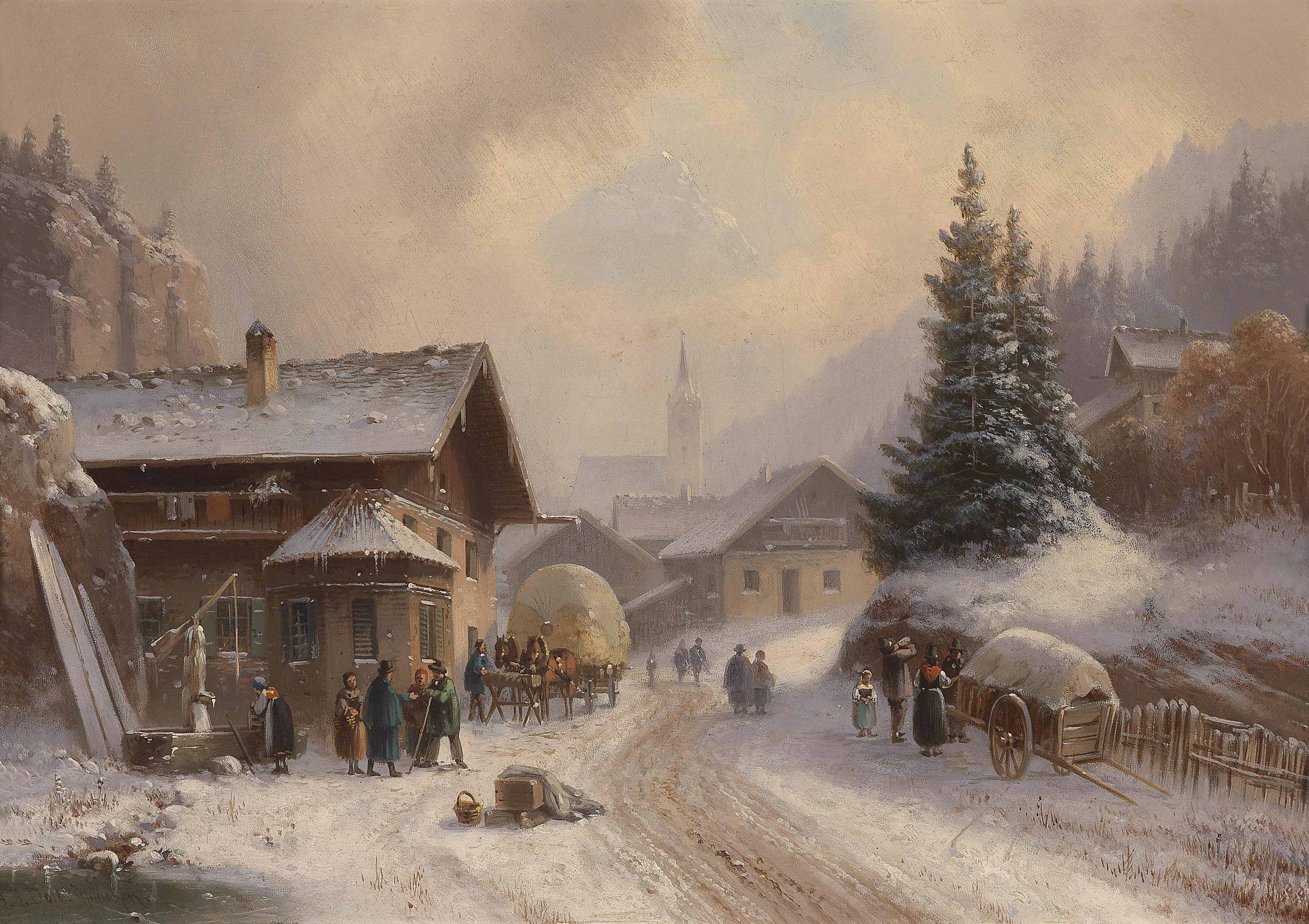 Dorfstraße im Winter, signiert A. Doll, München, Öl auf Karton, 29 x 38,5 cm